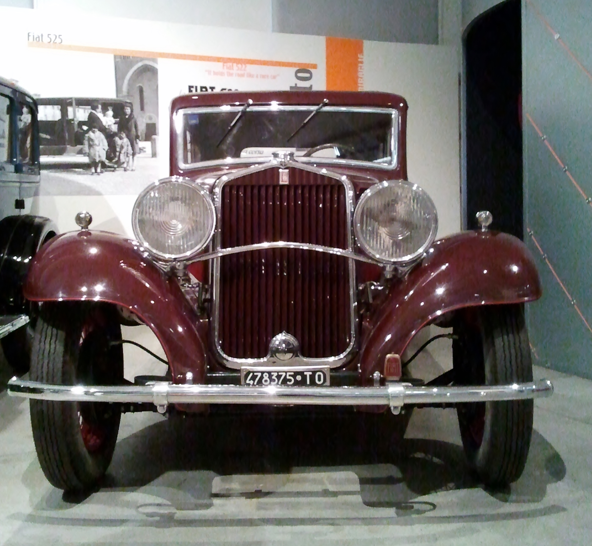 Fiat 522 S en el Centro Storico Fiat